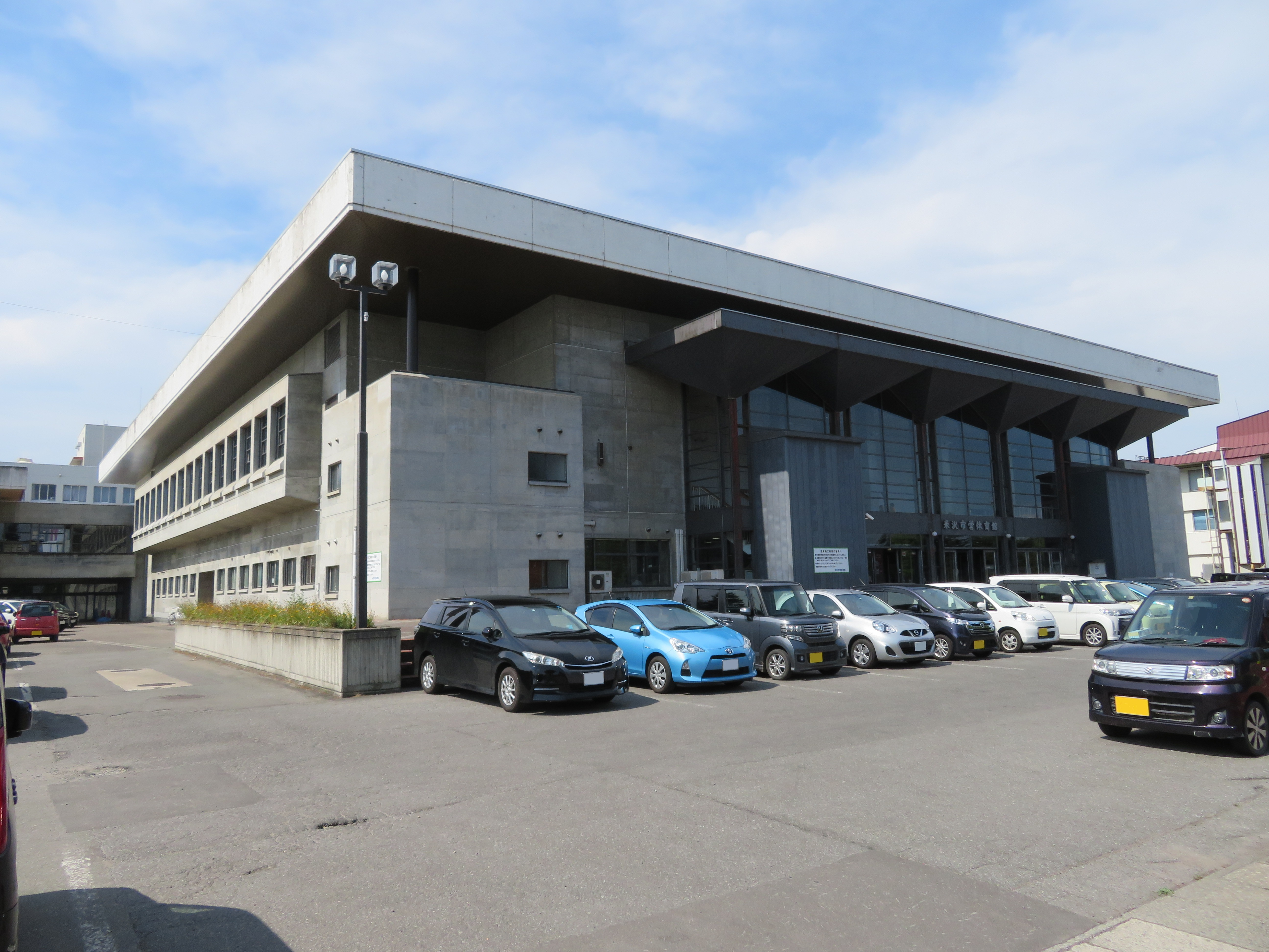 米沢市営体育館 Canon PowerShot SX720 HS